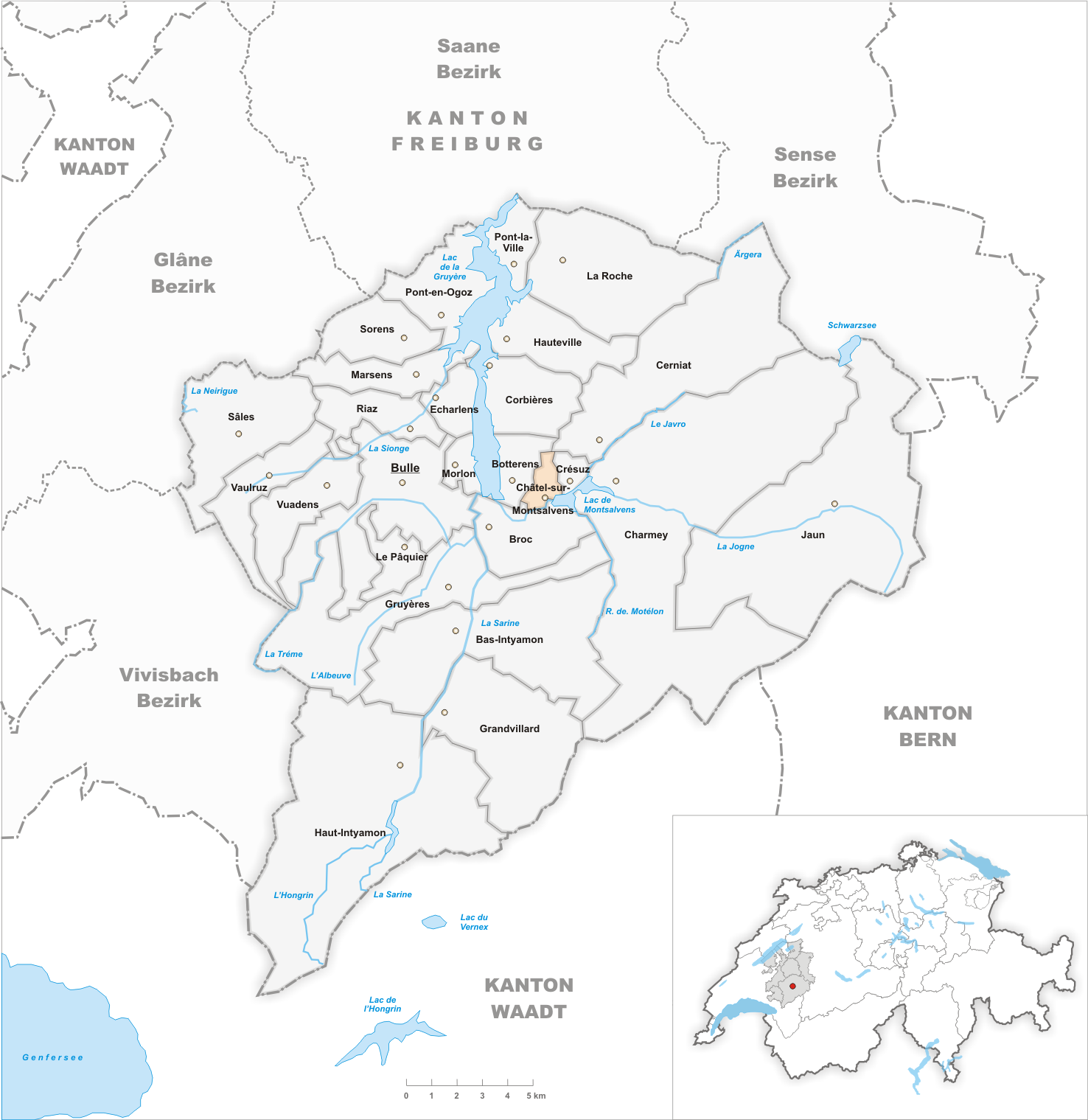 Municipality Châtel-sur-Montsalvens